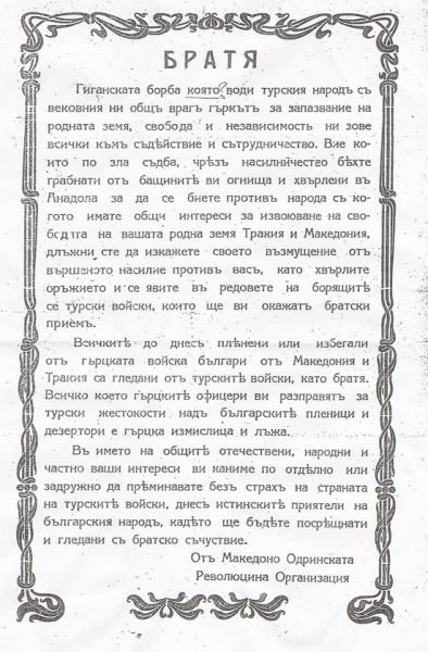 Позив на ВМРО от времето на Гръцко-турската война, призоваващ българите от Егейска Македония, мобилизирани в гръцката армия да дезертират.